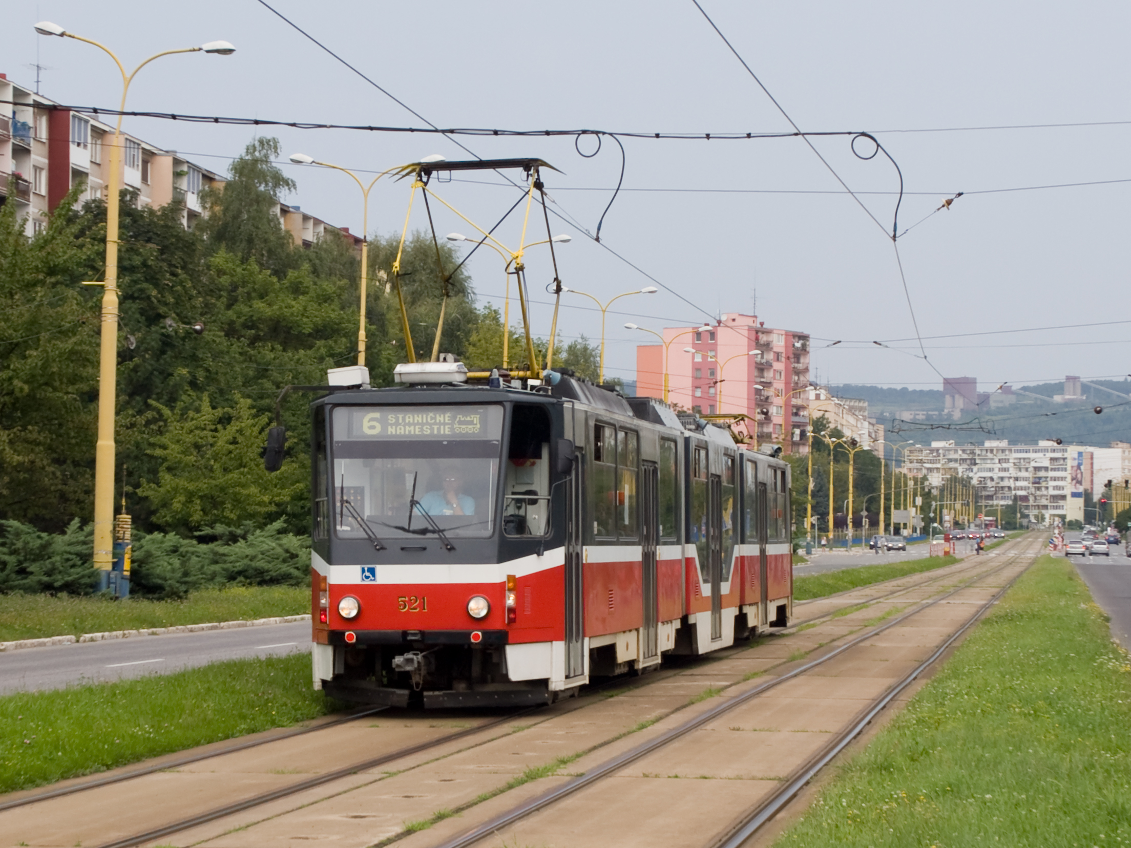 Tatra KT8D5R.N2 eč. 521 na lince 6 mezi stanicemi Magistrát mesta Košice a Bernolákova